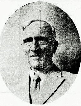 Φωτογραφία του λογοτέχνη Ιωάννη Γρυπάρη την εποχή που ήταν διευθυντής του Εθνικού θεάτρου.